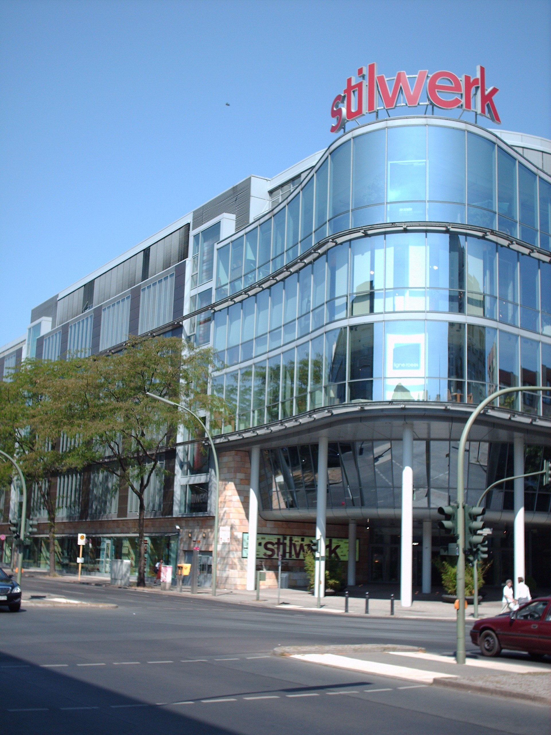 Einrichtungshaus Stilwerk in der Berliner Kantstraße